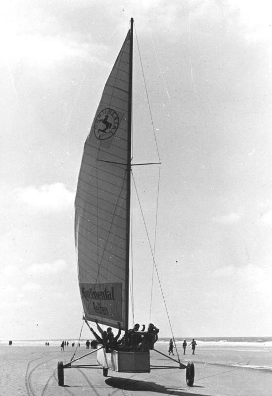 ADN-ZB/Illus/Vitanova Mit 80 Sachen übers Wattenmeer Mit einem Segelomnibus überraschte der Seeman Kurt Wossek, der früher an Bord der "Niobe" die Meere befuhr, in diesem Jahr die Badegäste von Norderney. 18 bis 20 Badegäste erleben in diesem Gefährt, das eine Segelfläche von 40 qm besitzt, die Freuden einer Segelpartie - ohne nass zu werden. Die Geschwindigkeit, die Kurt Wossek erreicht, beträgt je nach der Windstärke bis zu 80 Stundenkilometer. Wie jedes Segelboot kann Wossek mit seinem Segelomnibus auch gegen den Wind ankreuzen. 13-7-49 3585-49